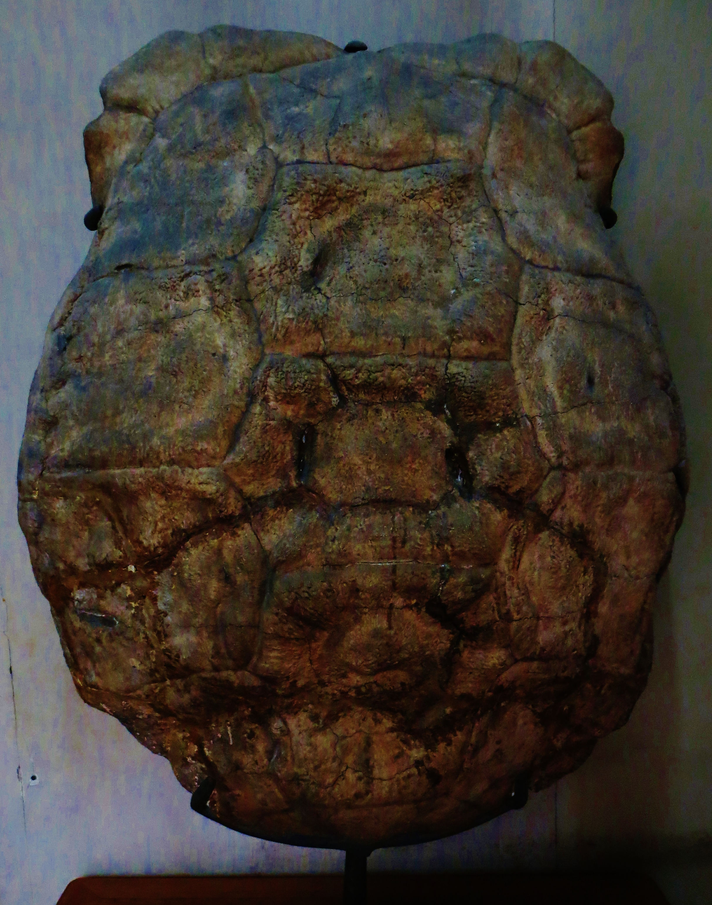 Fossil of Testudo, an extinct reptile- Took the photo at Musee d'Histoire Naturelle, Paris